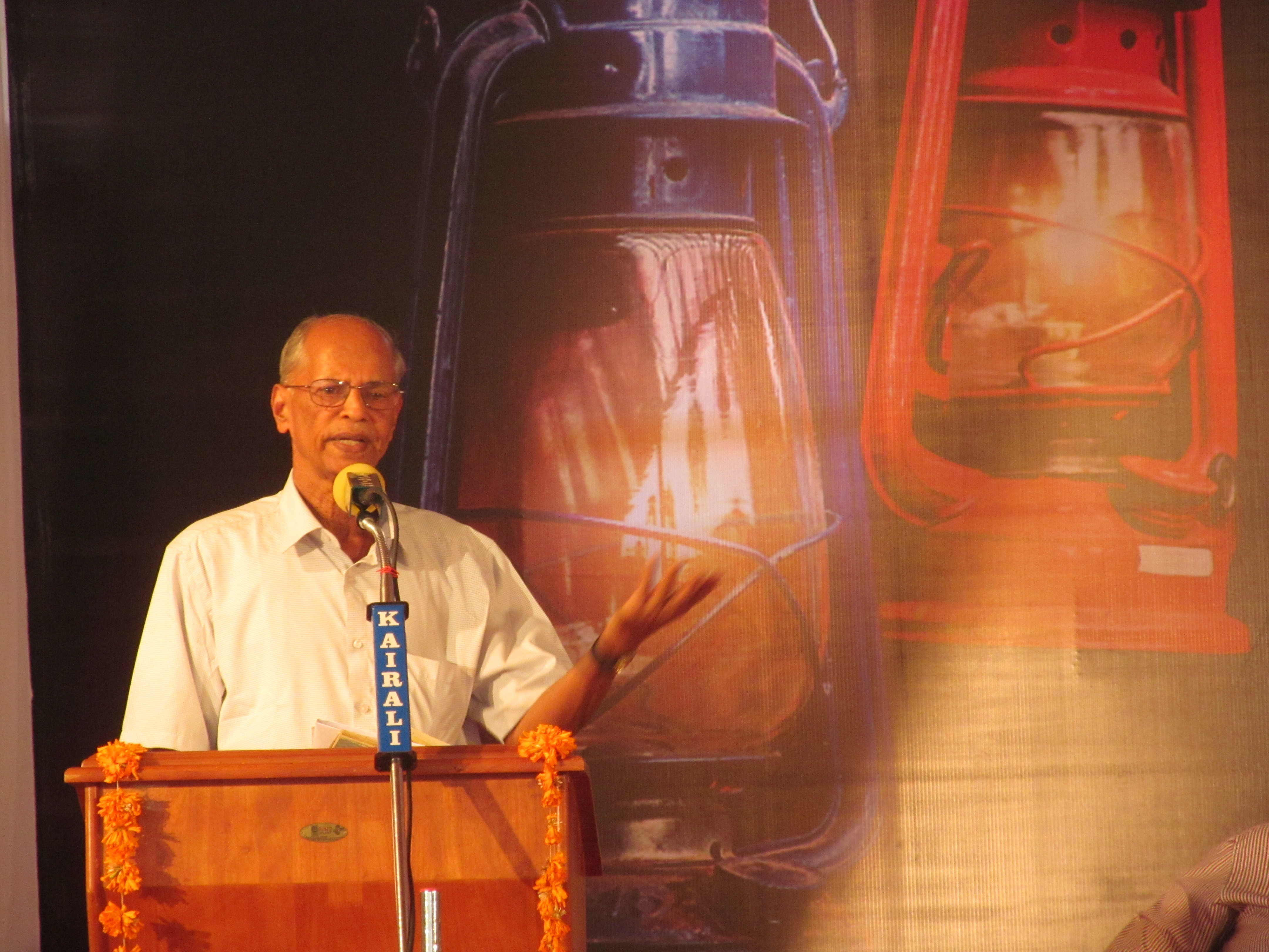 ചെറു പൈതങ്ങൾക്ക ഉപകാരാർത്ഥം ഇംക്ലീശിൽ നിന്ന പരിഭാഷപ്പെടുത്തിയ കഥകൾ (1824) എന്ന പുസ്തകത്തിന്റെ പ്രകാശനം, കേരള സാഹിത്യ അക്കാദമി പുസ്തകോത്സവം 2014 കേരളത്തില്‍ നിന്ന് അച്ചടിച്ച ആദ്യഗ്രന്ഥമെന്ന് അറിയപ്പെടുന്ന പുസ്തകമാണിത്. കേരളത്തിലെ അച്ചടിയുടെ ചരിത്രവുമായും ഭാഷാപരമായും ഗദ്യസാഹിത്യപരമായും ടൈപ്പോഗ്രാഫിയുമൊക്കെയായി വളരെയധികം പ്രാധാന്യമുള്ള സവിശേഷമായ പുസ്തകമാണിത്. ബ്രിട്ടീഷ് ലൈബ്രറിയില്‍ നിന്ന് കണ്ടെടുത്ത ഈ പുസ്തകം ആദ്യമായിട്ടാണ് അതേരൂപത്തില്‍ മലയാളികള്‍ക്ക് ലഭ്യമാകുന്നത്. പ്രകാശന സദസില്‍; സുനില്‍ പ്രഭാകര്‍, ഡോ. ബാബു ചെറിയാന്‍, ജോർജ് ഇരുമ്പയം, പെരുമ്പടം ശ്രീധരന്‍, ആര്‍. ഗോപാലകൃഷ്ണന്‍, രാജേന്ദ്രന്‍.